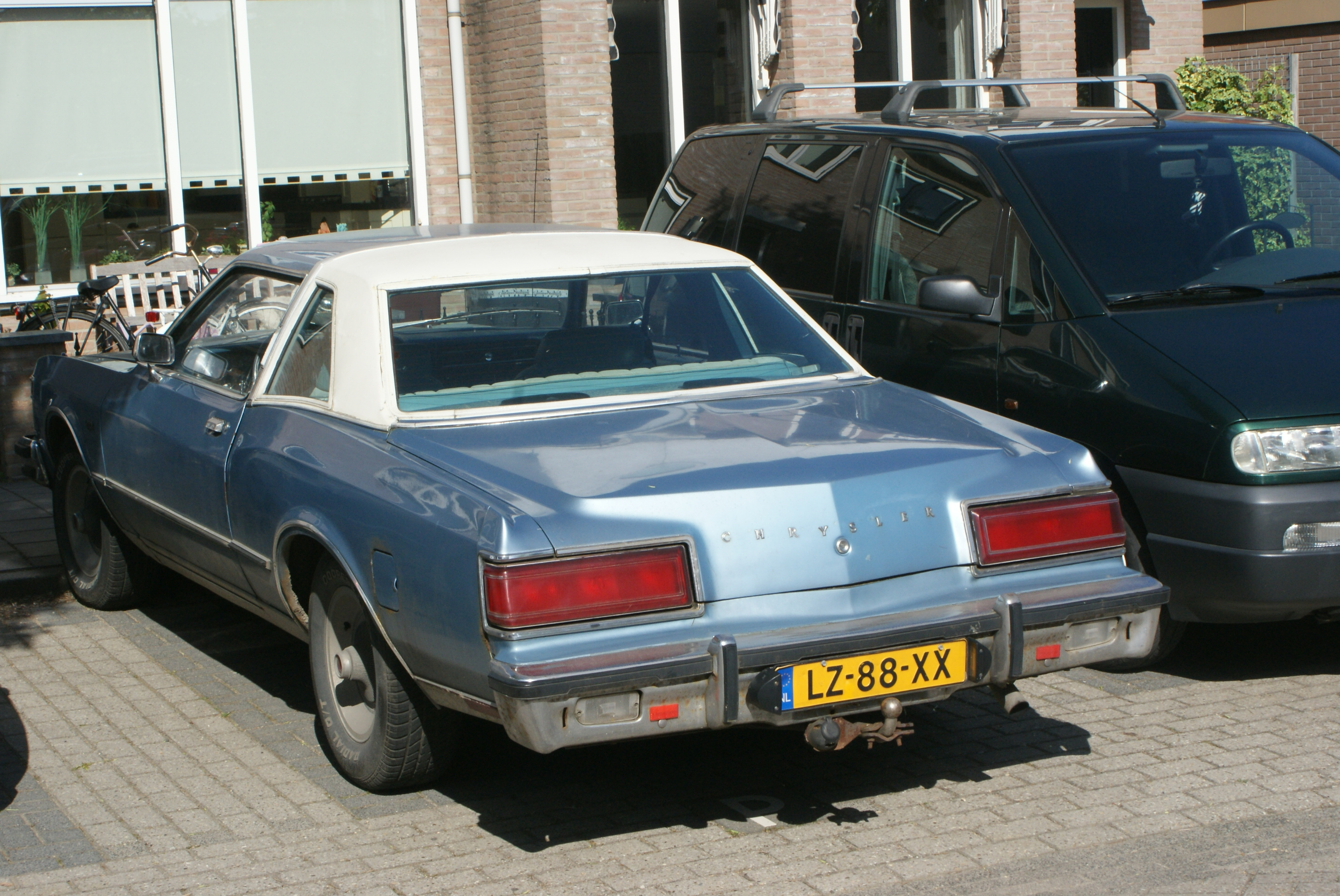 LZ-88-XX